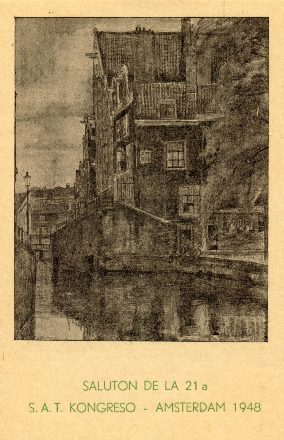 Poŝtkarto de la SAT-Kongreso en Amsterdamo, 1948